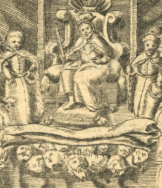 Grafika przedstawiająca króla Ludwika Węgierskiego na mitycznym rokoszu Granowskiego